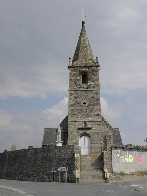 Église Saint-Pierre à Huisnes-sur-Mer (50).